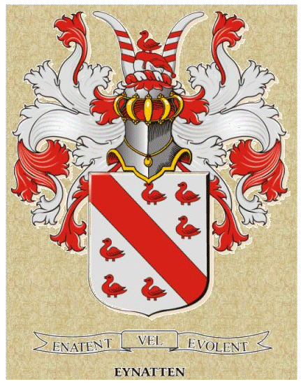 Familie wapen van de familie Eijnatten bewoners van kasteel Reijmersbeek te Nuth